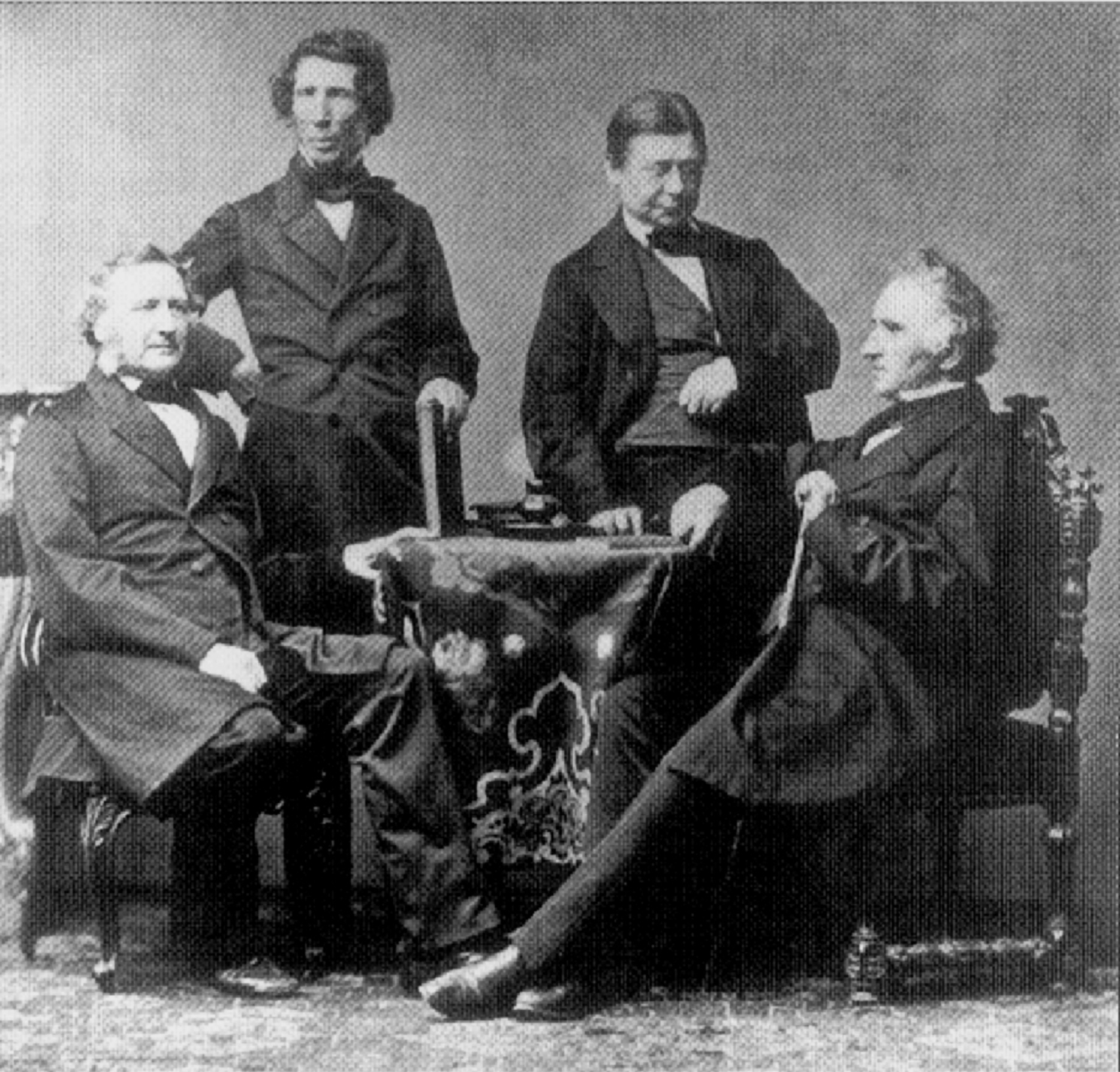 Deutsche Chemiker in München bei Liebig Hermann Kopp (* 30. Oktober 1817 in Hanau; † 20. Februar 1892 in Heidelberg) Friedrich Wöhler (* 31. Juli 1800 in Eschersheim (heute Frankfurt am Main); † 23. September 1882 in Göttingen) Johann Heinrich Buff (* 23. Mai 1805 in Rödelheim bei Frankfurt am Main; † 24. Dezember 1878 in Gießen) Justus von Liebig (* 12. Mai 1803 in Darmstadt; † 18. April 1873 in München)